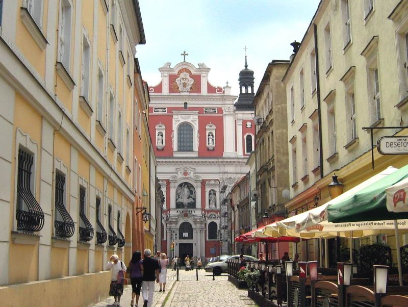 Ulica Świętosławska i Fara